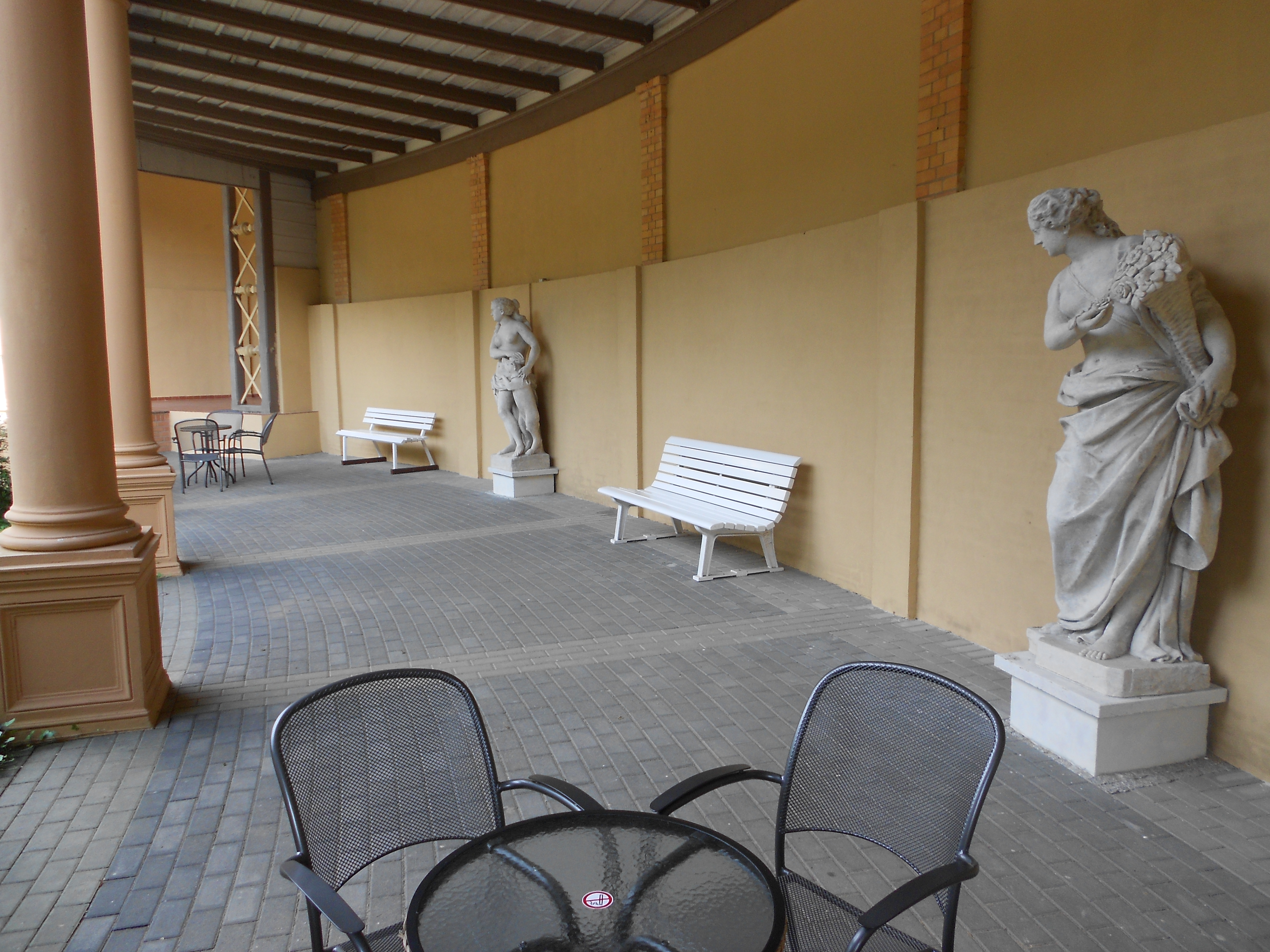 Fachklinik und Moorbad Bad Freienwalde